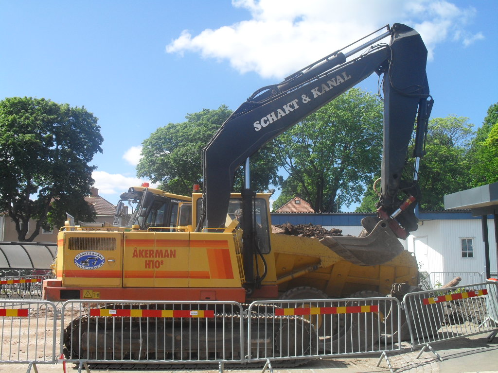 En grävmaskin